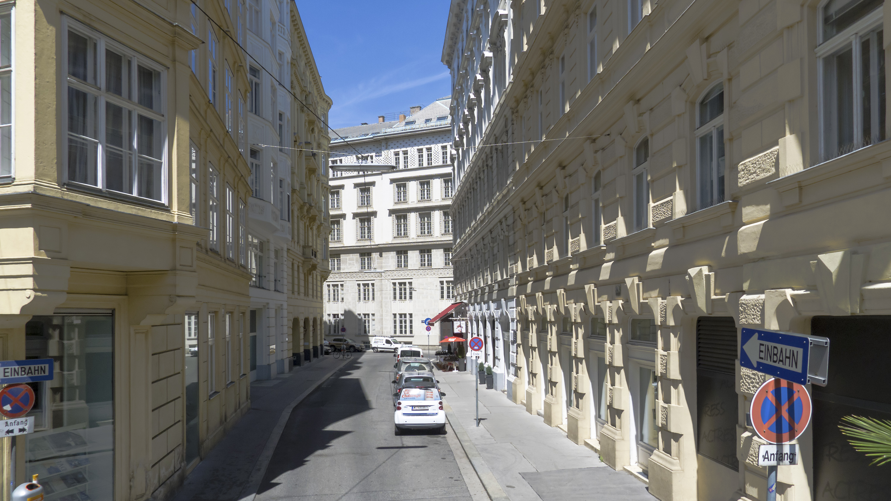 An der Hülben in Wien 1 bei der Liebenberggasse Richtung Norden